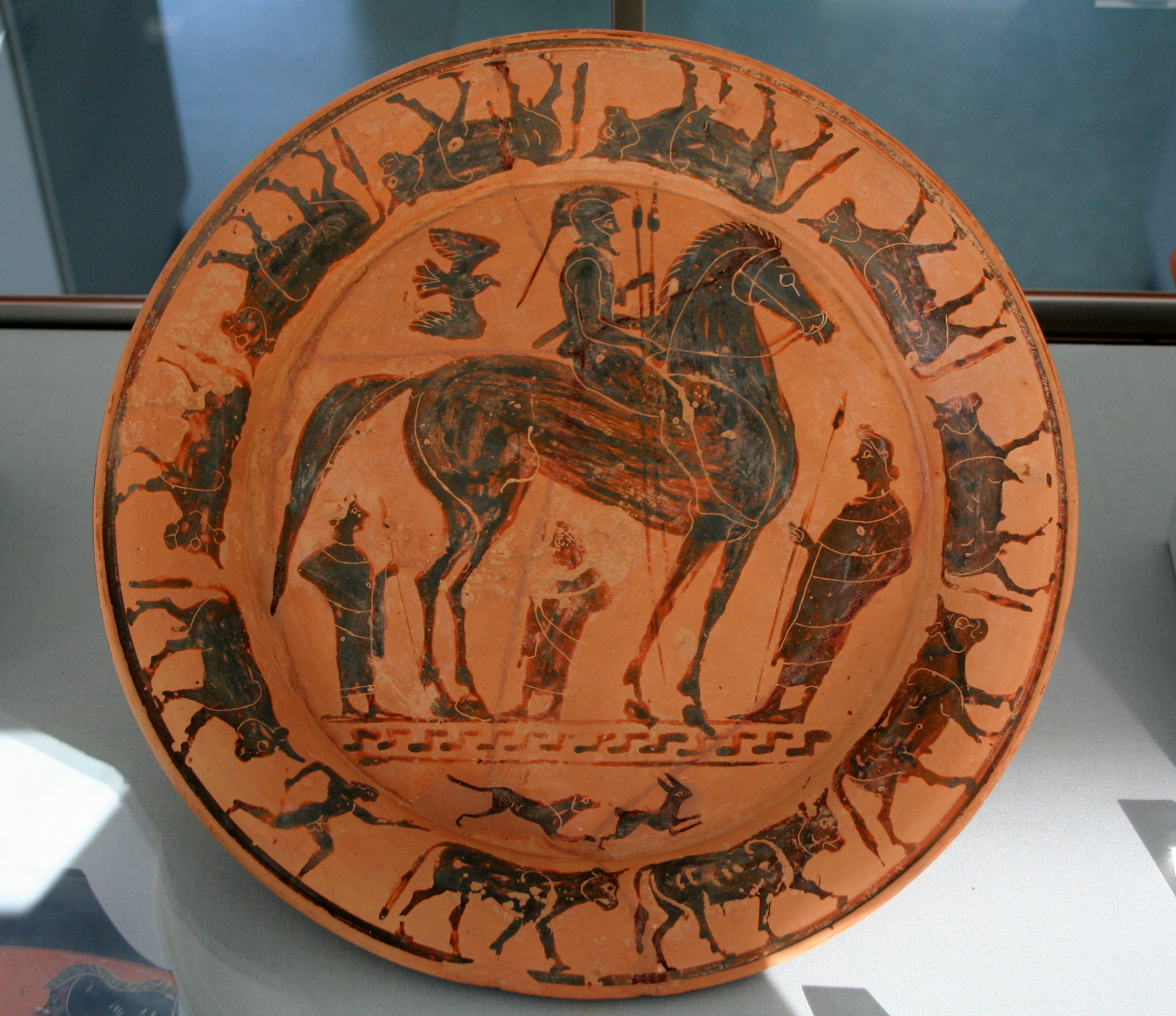 Antikenmuseum der Universität Heidelberg